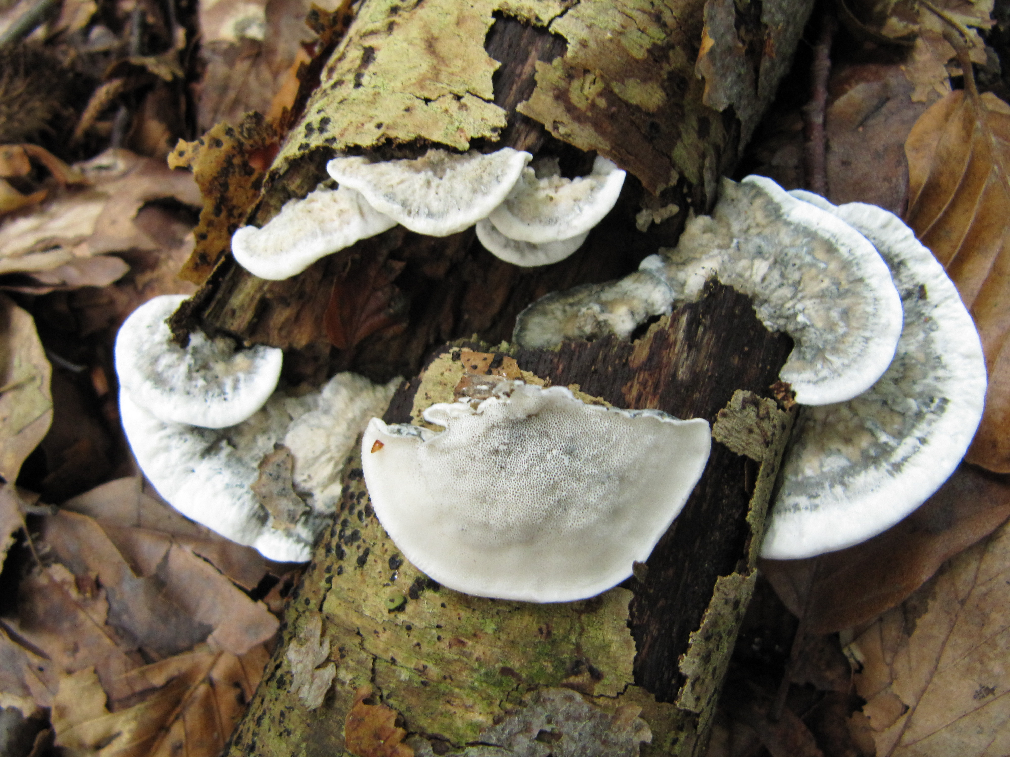 Fastblauer Saftporling (Postia subcaesia syn. Oligoporus subcaesius)